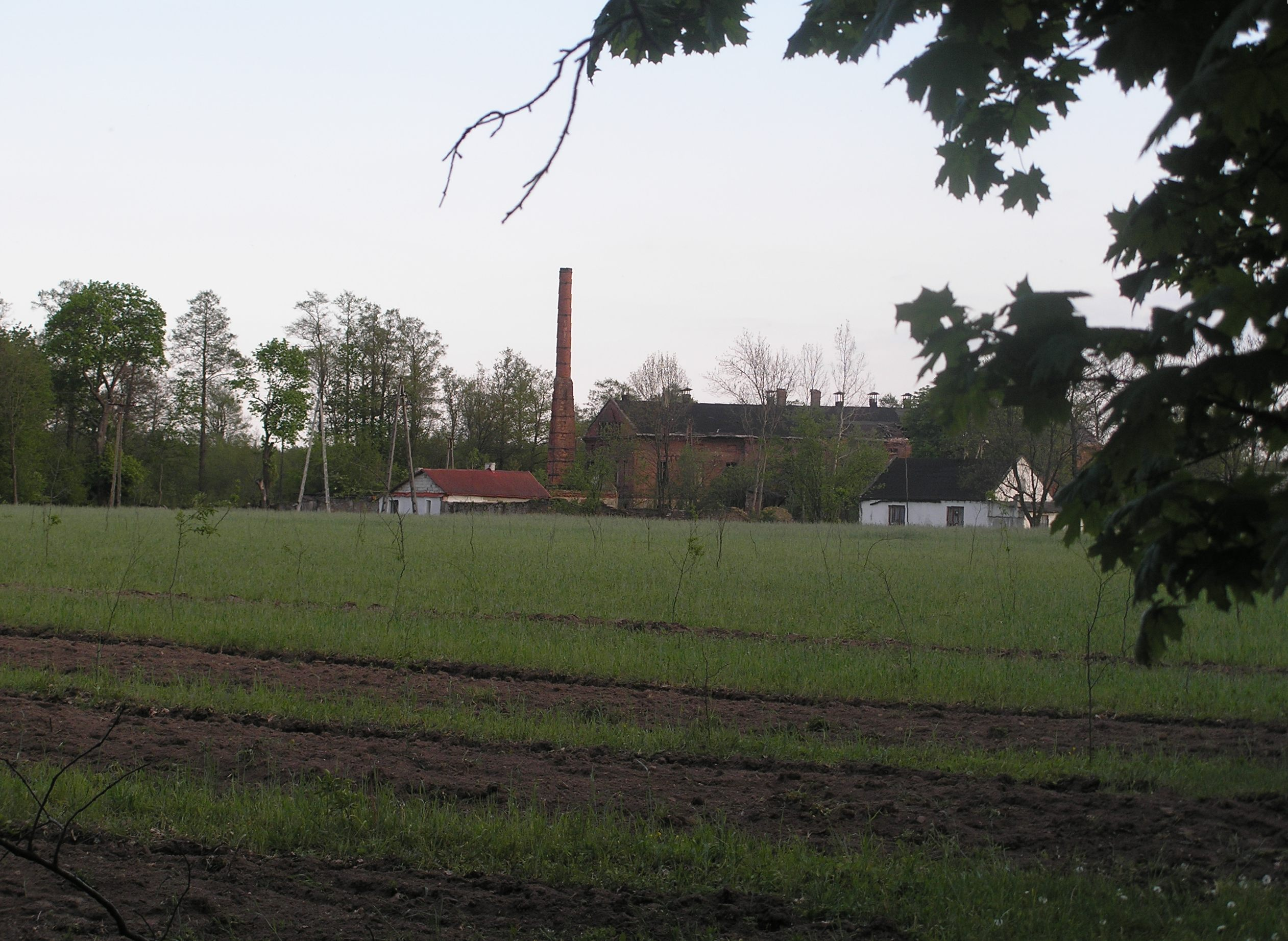 Machory. Widok na zakład od strony ogrodu.